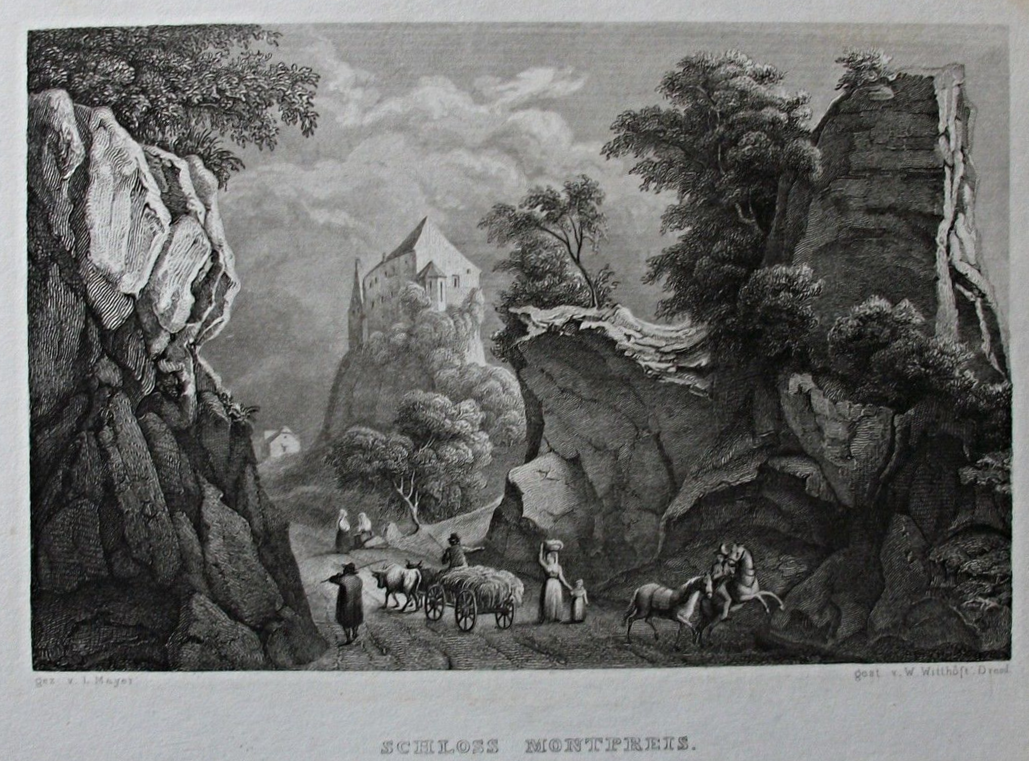 Schloss Montpreis (Burg Montpreis, auch: Montpreiß, Monpreiß, Monpreis bzw. Schloss Planina, slowenisch: Grad Planina) auf einer Lithografie (Stahlstich) von vor 1840 (Werksverzeichnis Nebehay-W. 695/33): Zeichner: Louis Mayer (1791-1843)), deutscher Maler Stahlstecher: Johann Wilhelm Friedrich Witthöft (1816-1874), deutscher Radierer, Kupfer- und Stahlstecher Bildgröße des Originals: 15 x 10 cm